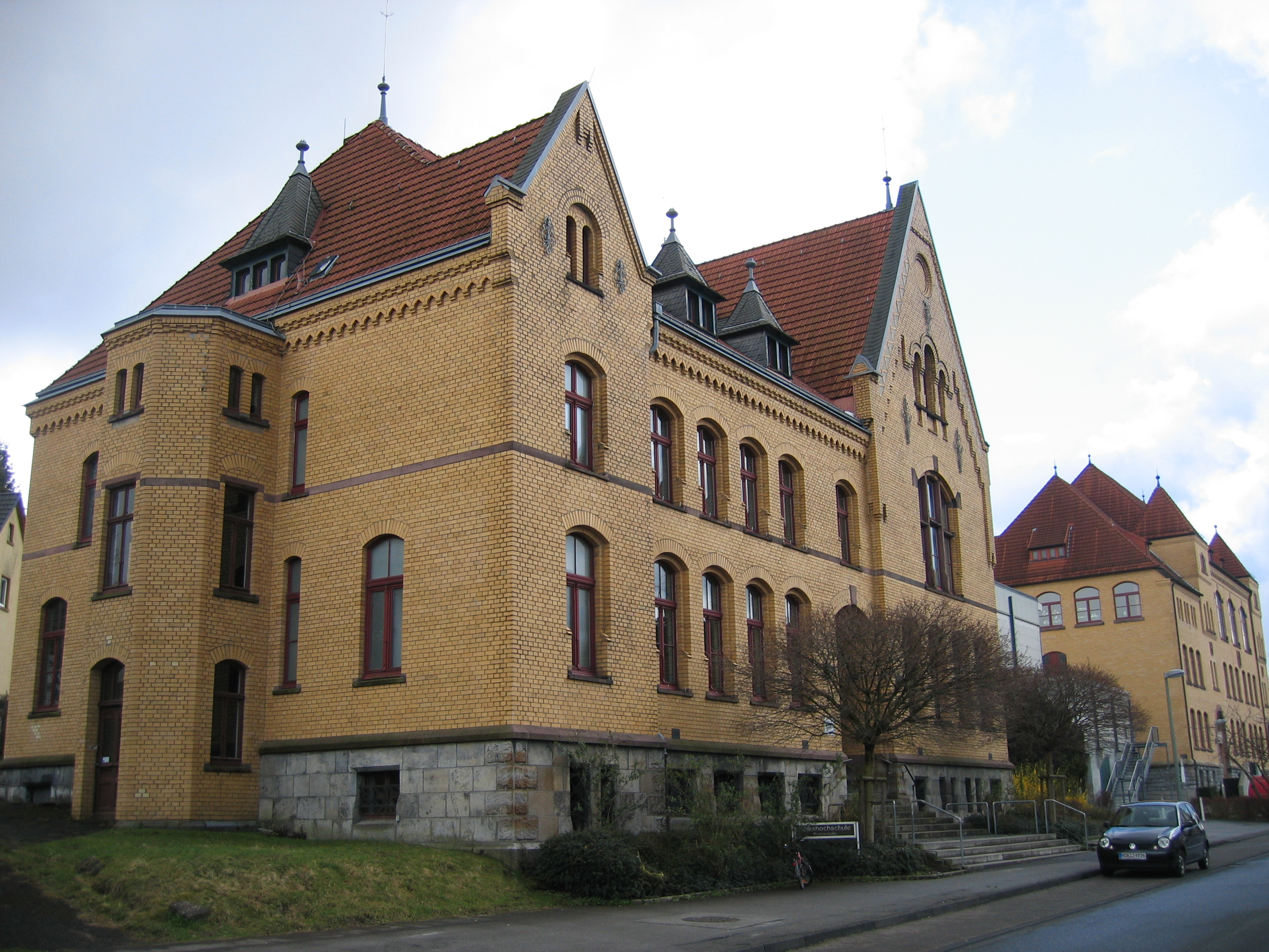 Volkshochschule Arnsberg